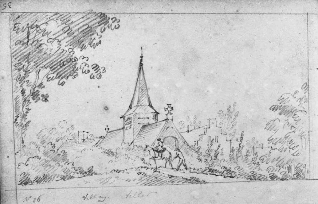 dorpsgezicht: dorpsgezicht, reproduktie uit schetsboek Dirk Verrijk